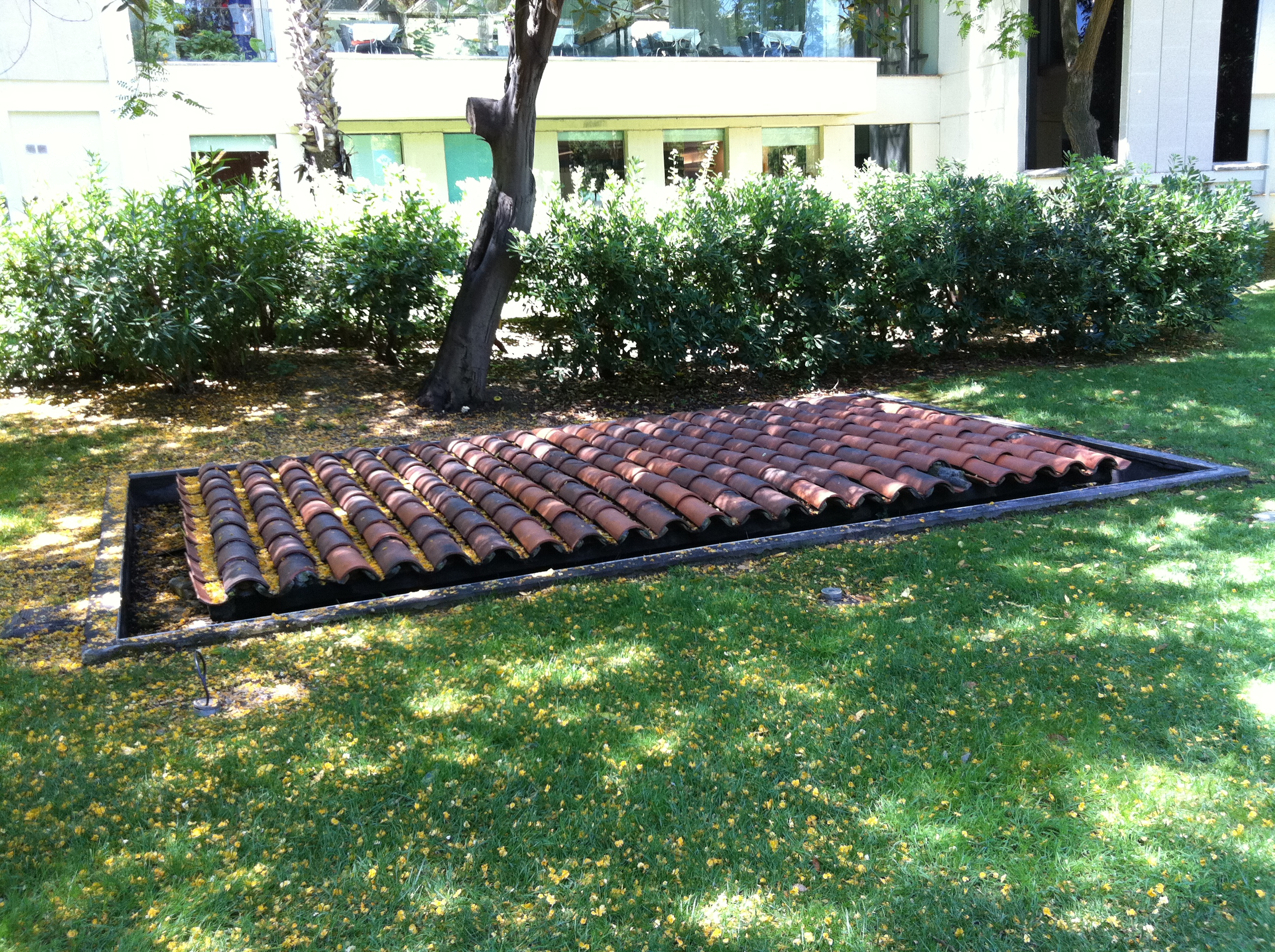 Jardí de les Escultures de Barcelona